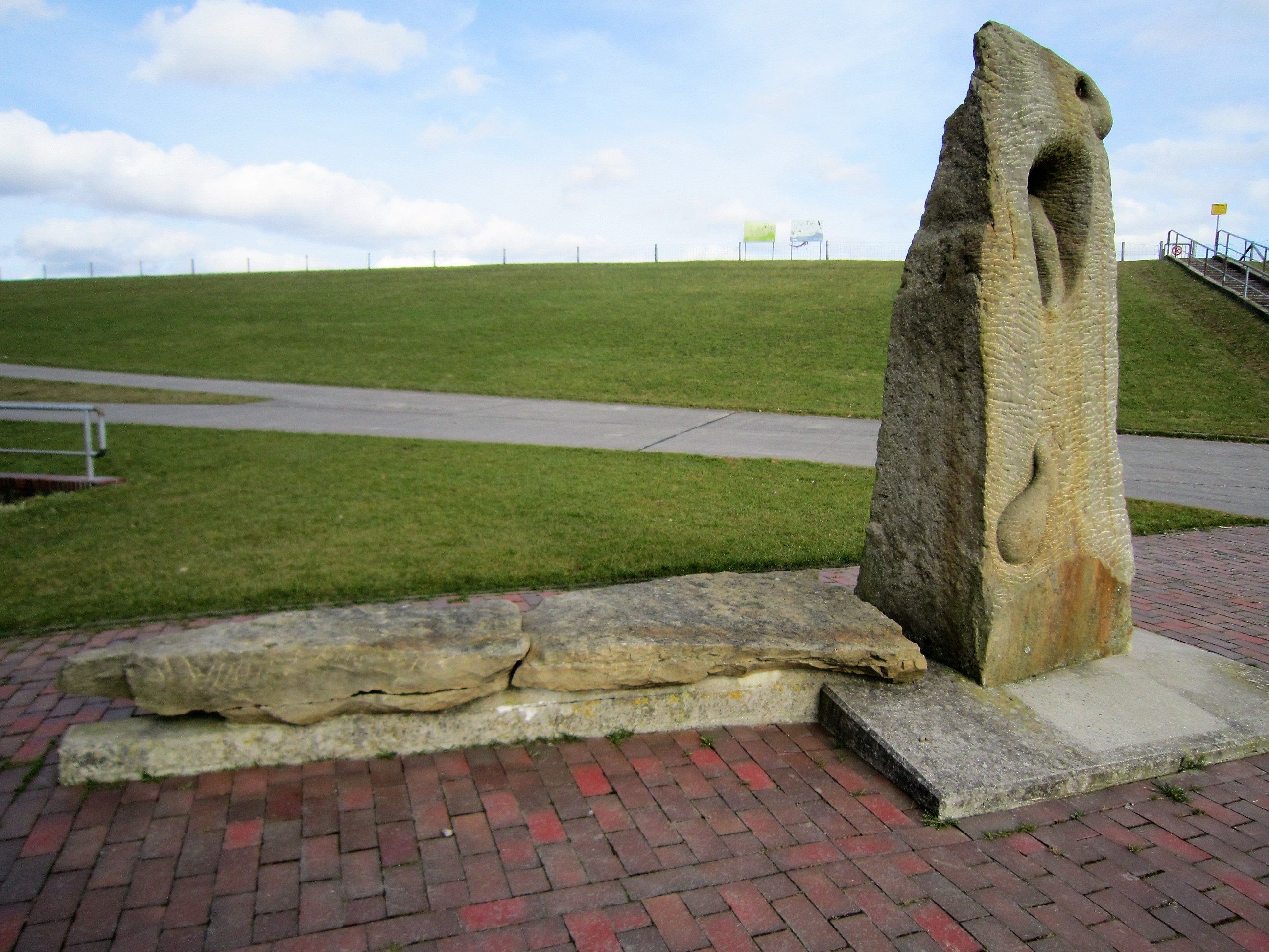 Skulptur "3. Schöpfungstag: „Erde und Meer – Die Pflanzen“" von Thorsten Schütt in Cäciliengroden Süd (Gemeinde Sande, Landkreis Friesland in Niedersachsen). Die Skulptur ist Station 3 des "Skulpturenpfads Kunst am Deich" am Radweg zwischen Mariensiel und Dangast, der parallel zum Jadebusen-Deich verläuft.